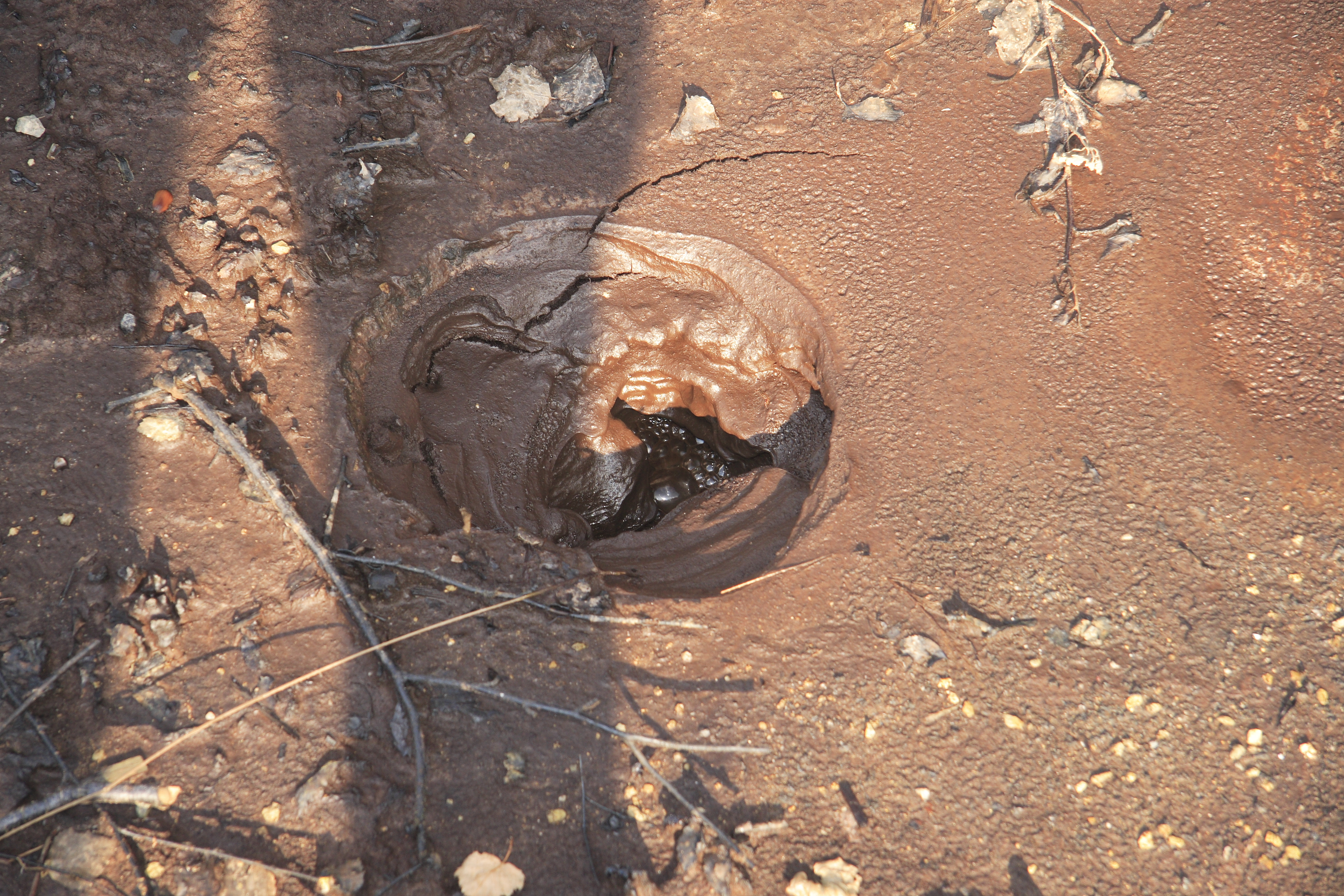 "Trockene" Mofette, Naturreservat Soos, Tschechische Republik